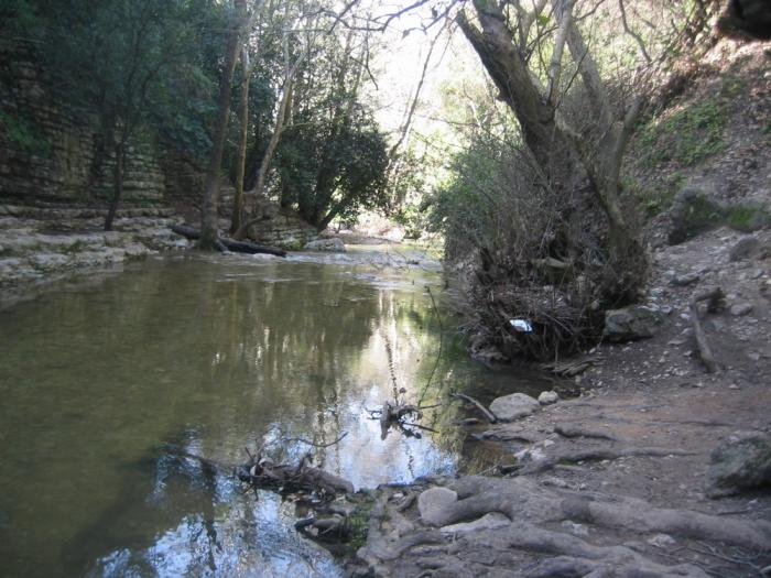 נחל כזיב